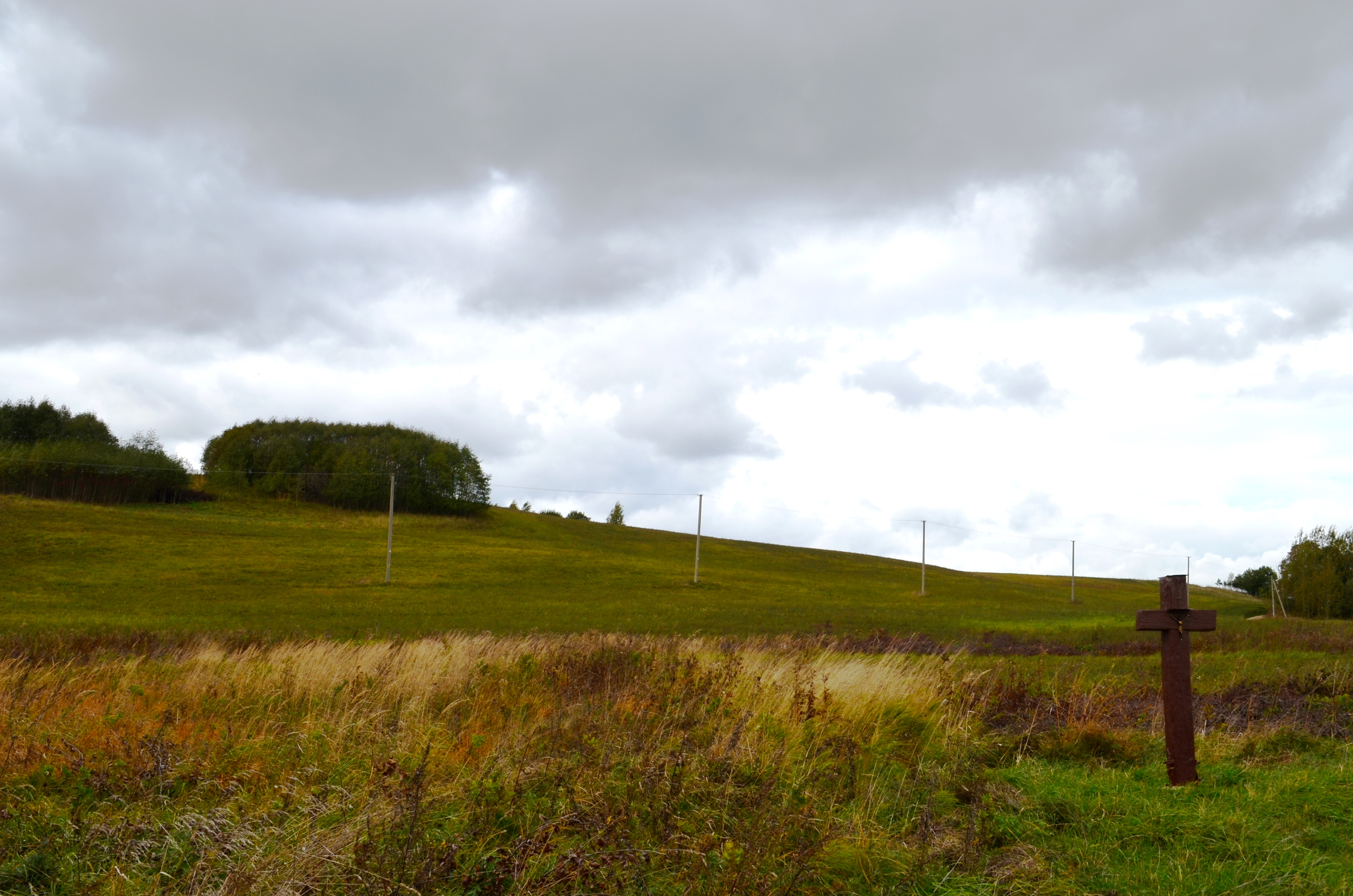 Gaudkalnis, Telšių raj.